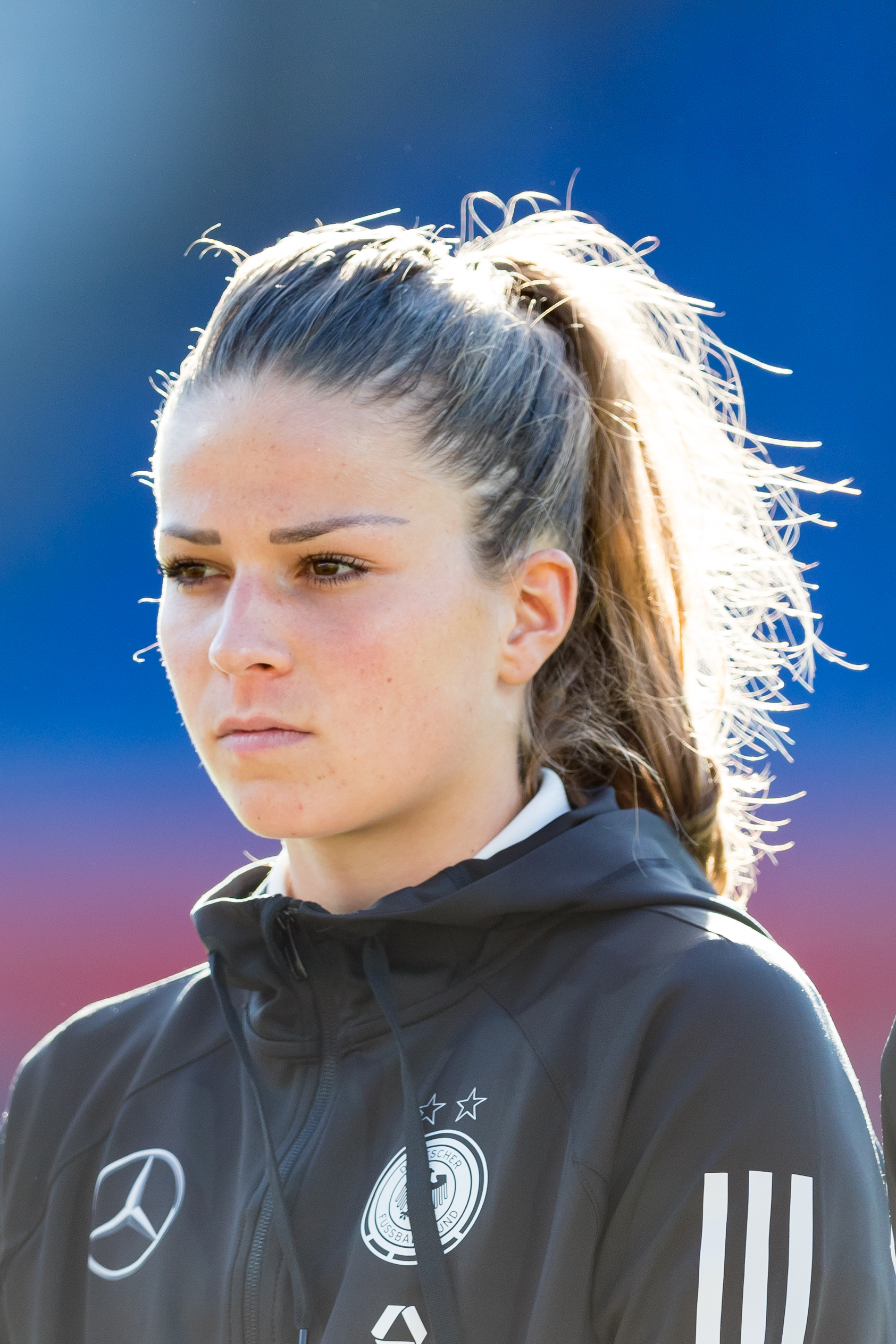 during Fussball Frauen Deutschland vs Island at Brita-Arena, Wiesbaden, Hessen, Germany on 2017-10-20, Photo: Sven Mandel